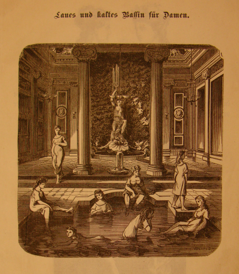 Roemerbad-Wien 1873